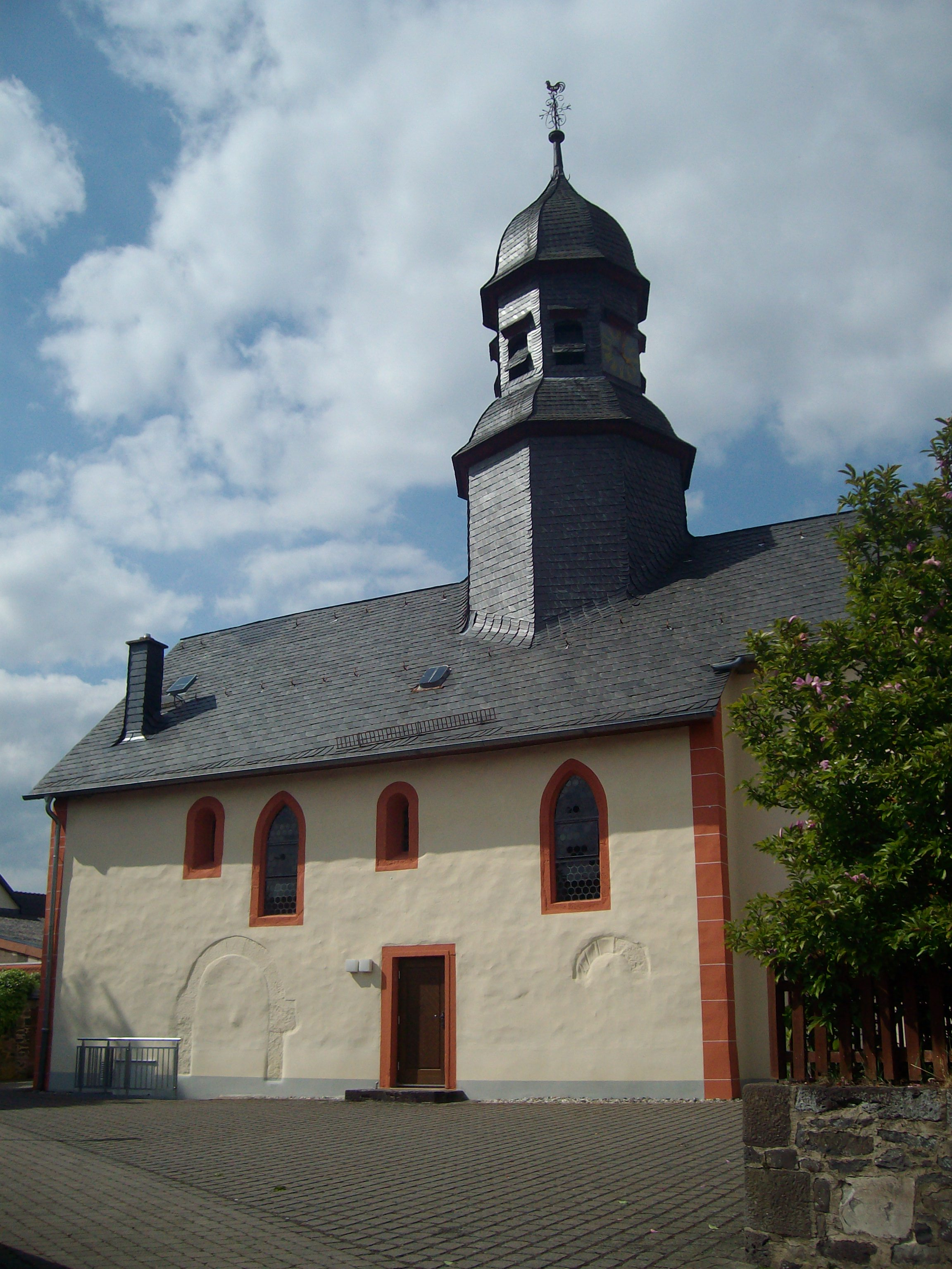 Evangelische Kirche Queckborn, Grünberg, Landkreis Gießen, Hessen, Deutschland